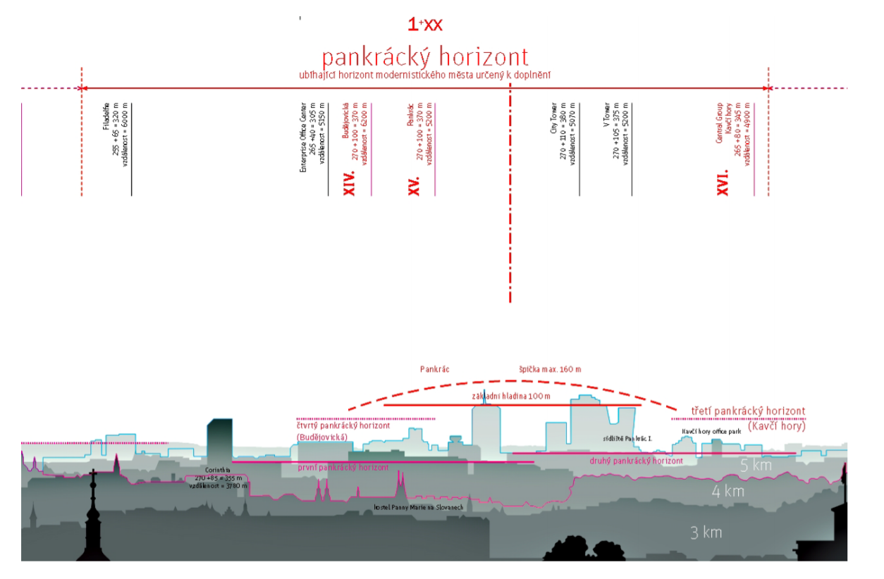 Візуальний горизонт Панкрацу. Починаючи з 1970-х років в Панкраці споруджено кілька висотних житлових будинків, які змінили обличчя цього району Праги. Тут знаходяться найвищі будівлі міста - 109-метровий хмарочос City Tower і 104-метровий City Empiria.